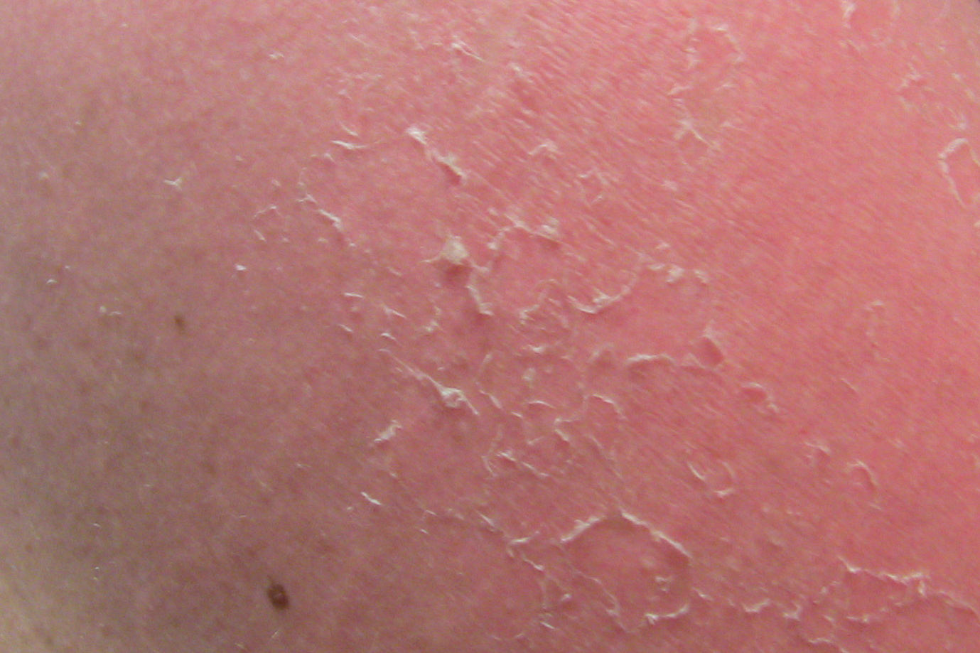 Sun burnt skin beginning to peel.